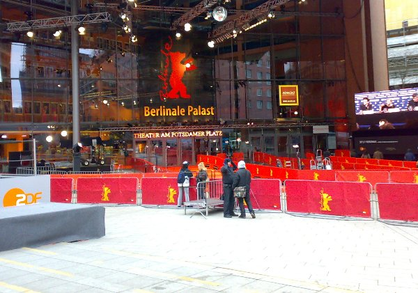 Berlinale-Palast am Potsdamer Platz zur Berlinale 2009